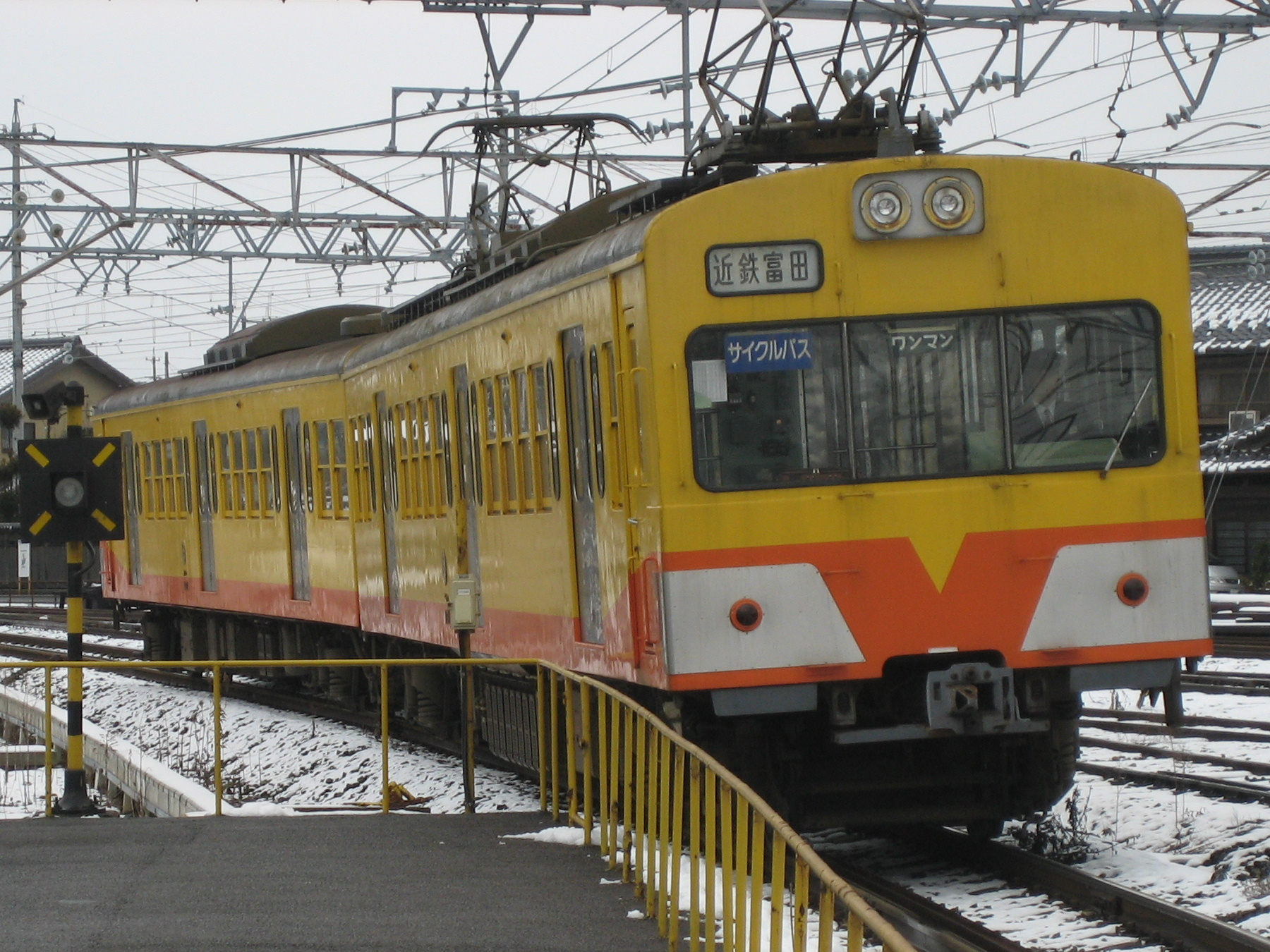 三岐鉄道